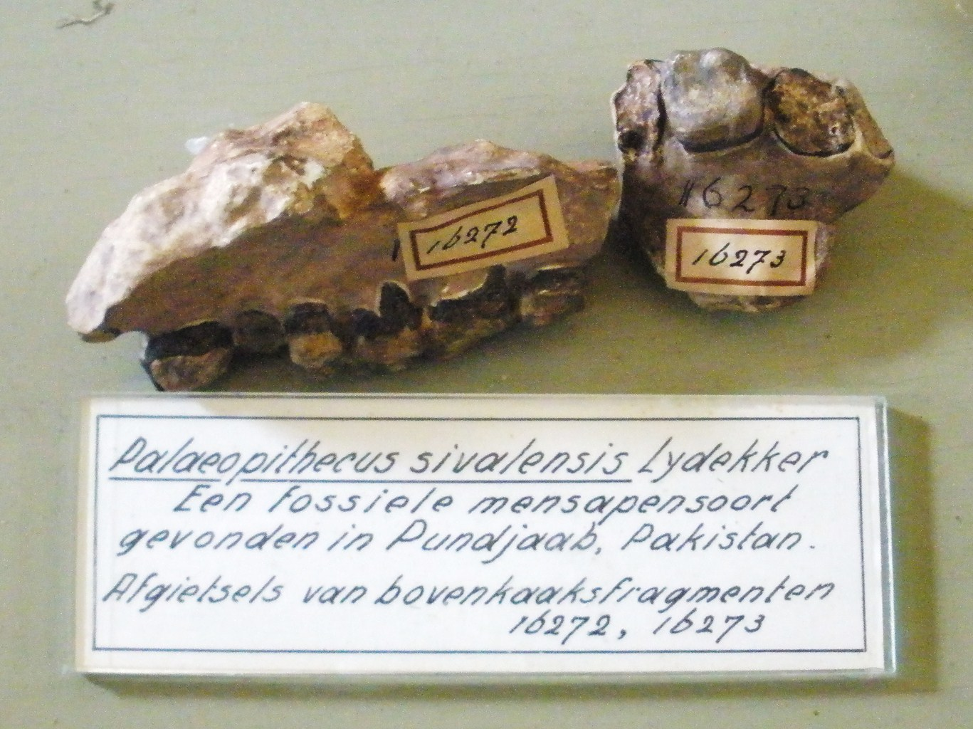 Fossil of Palaeopithecus, an extinct ape - Took the photo at Teylers Museum, Haarlem